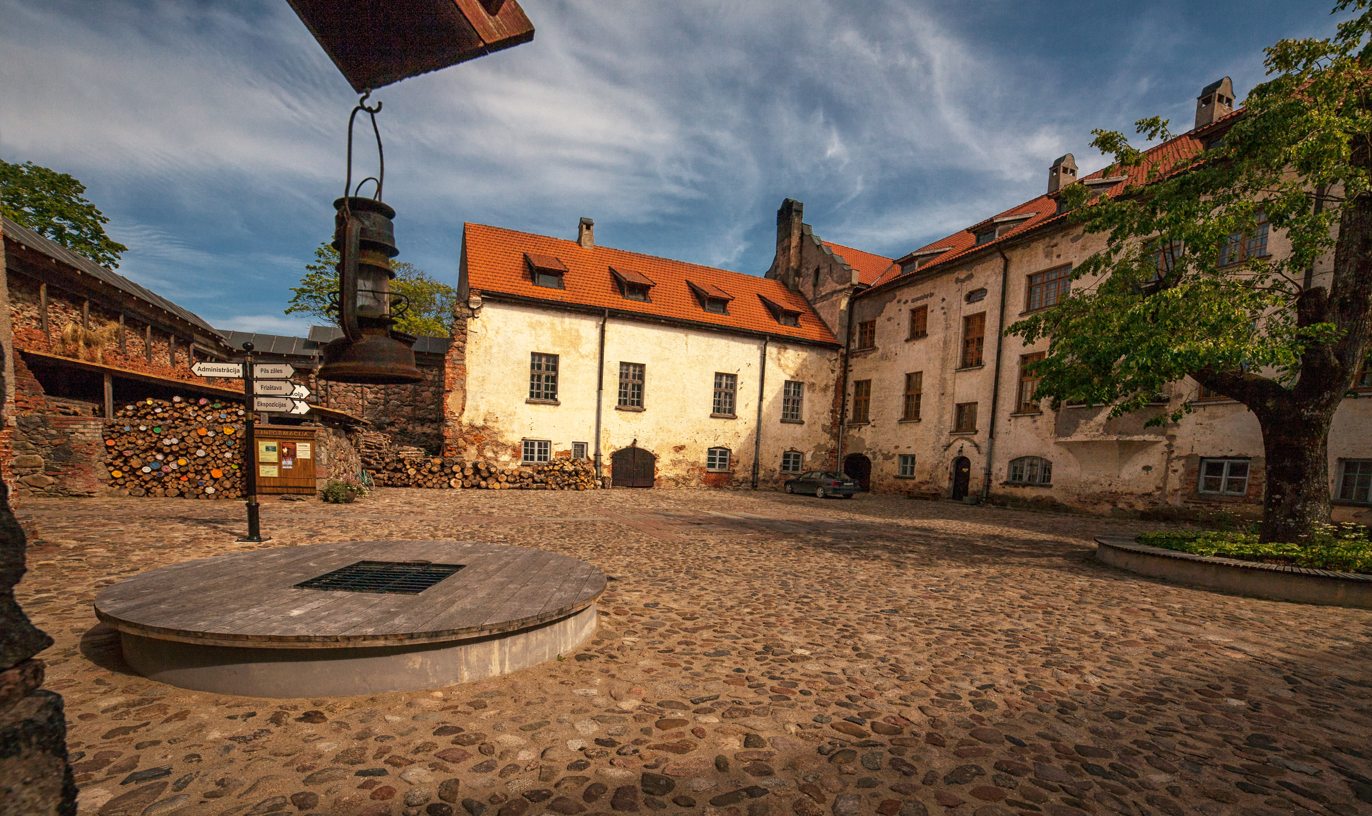 Dundagas pils, Dundaga, Pils iela 12